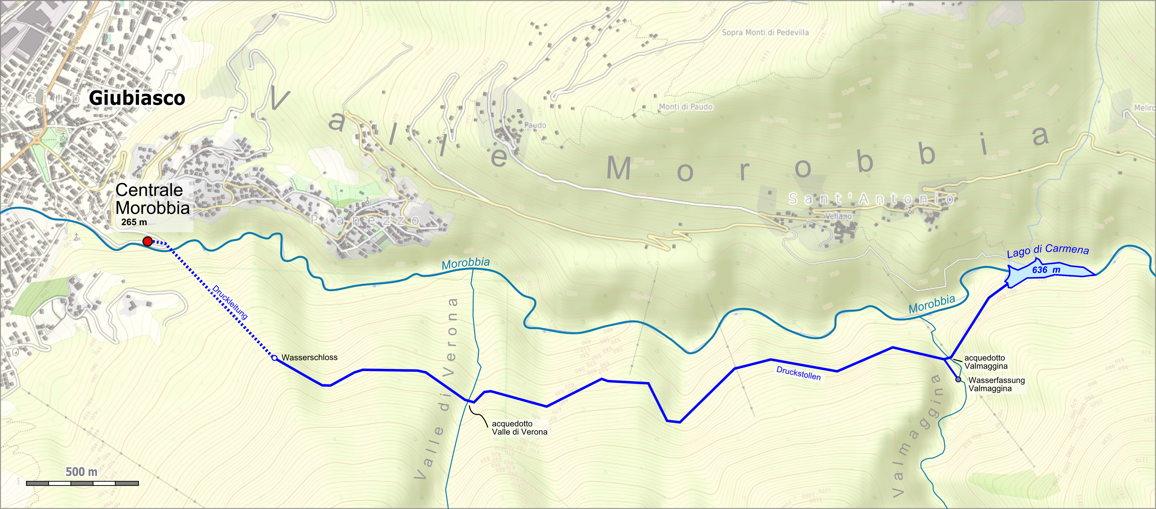 Lagekarte des Kraftwerks Morobbia